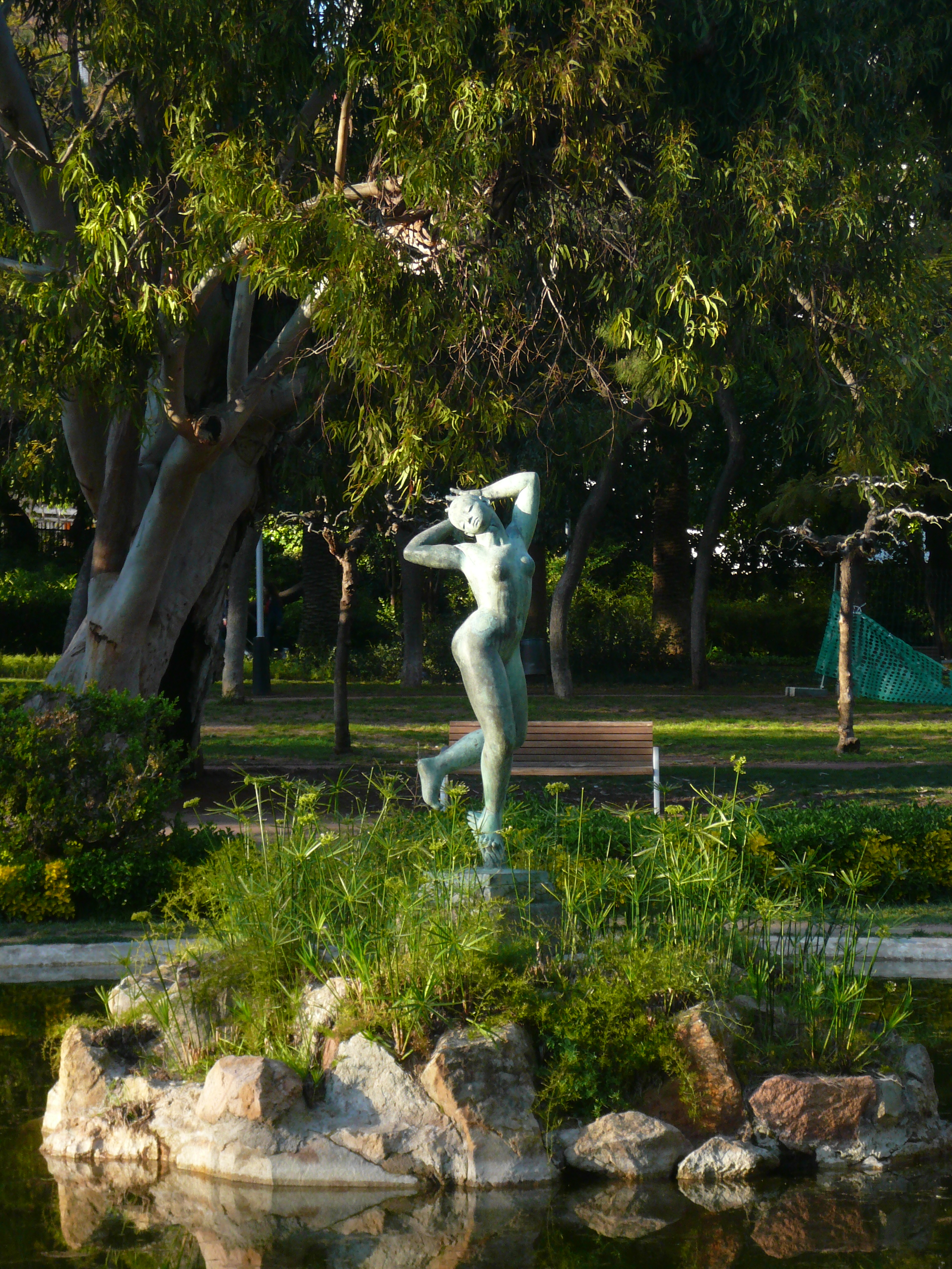 Dríade, al parc de Vil·la Amèlia, a Sarrià.